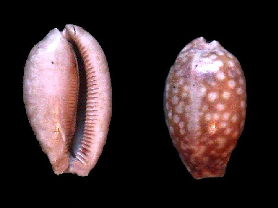 Cypraea zebra del Archipiélago Los Roques, Dependencias Federales - Venezuela.